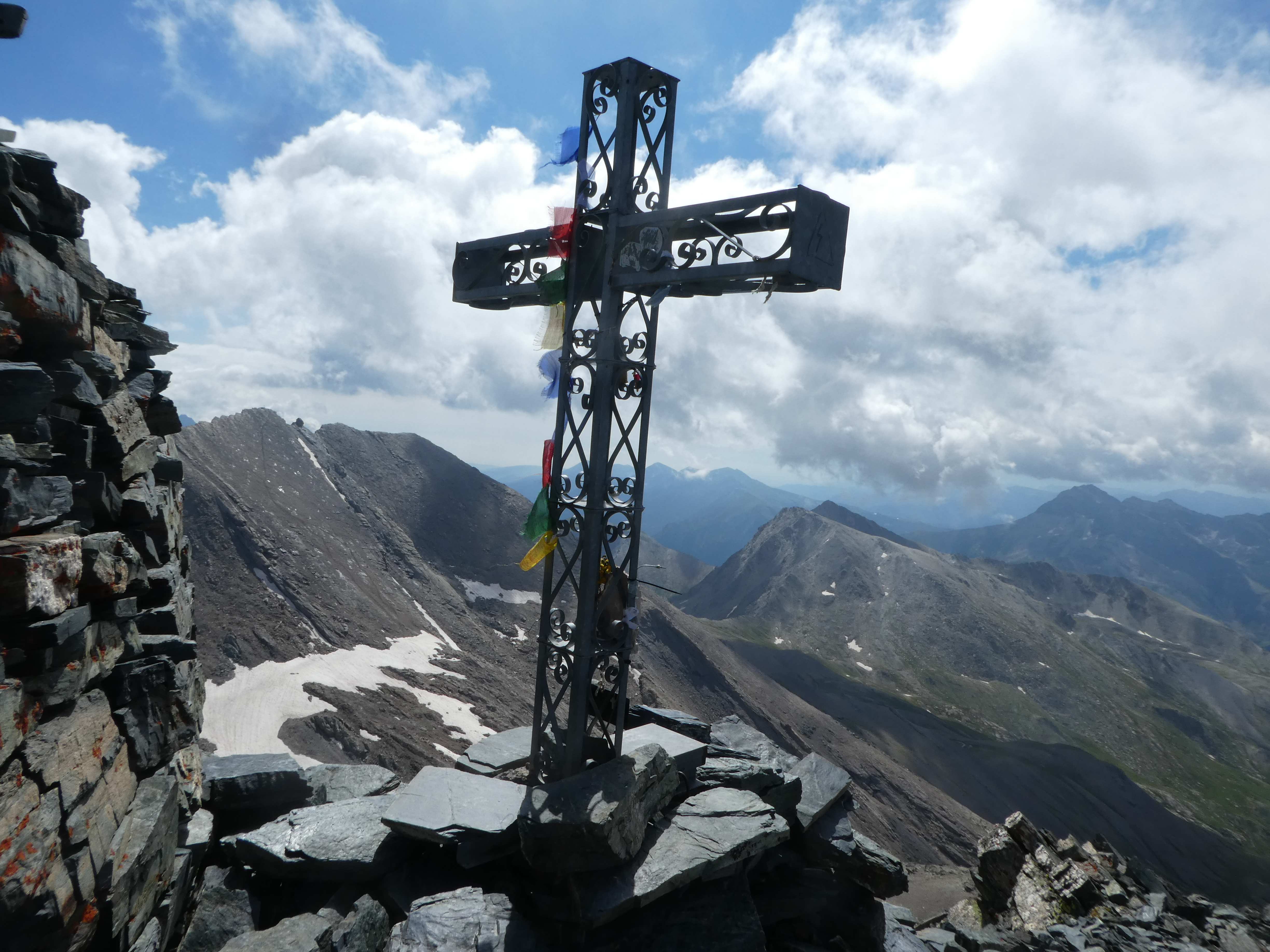 La croce di vetta sulla Cima Mongioia